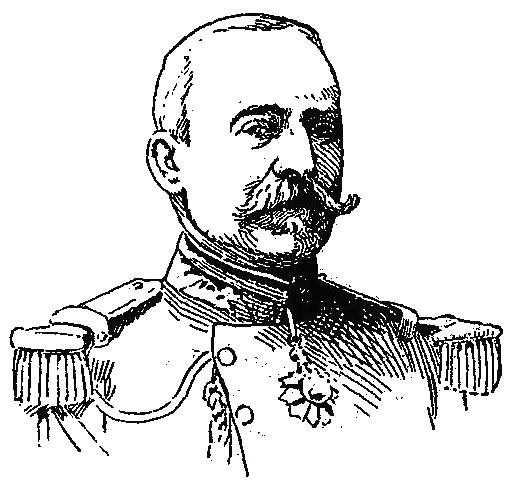 "Général Roget".